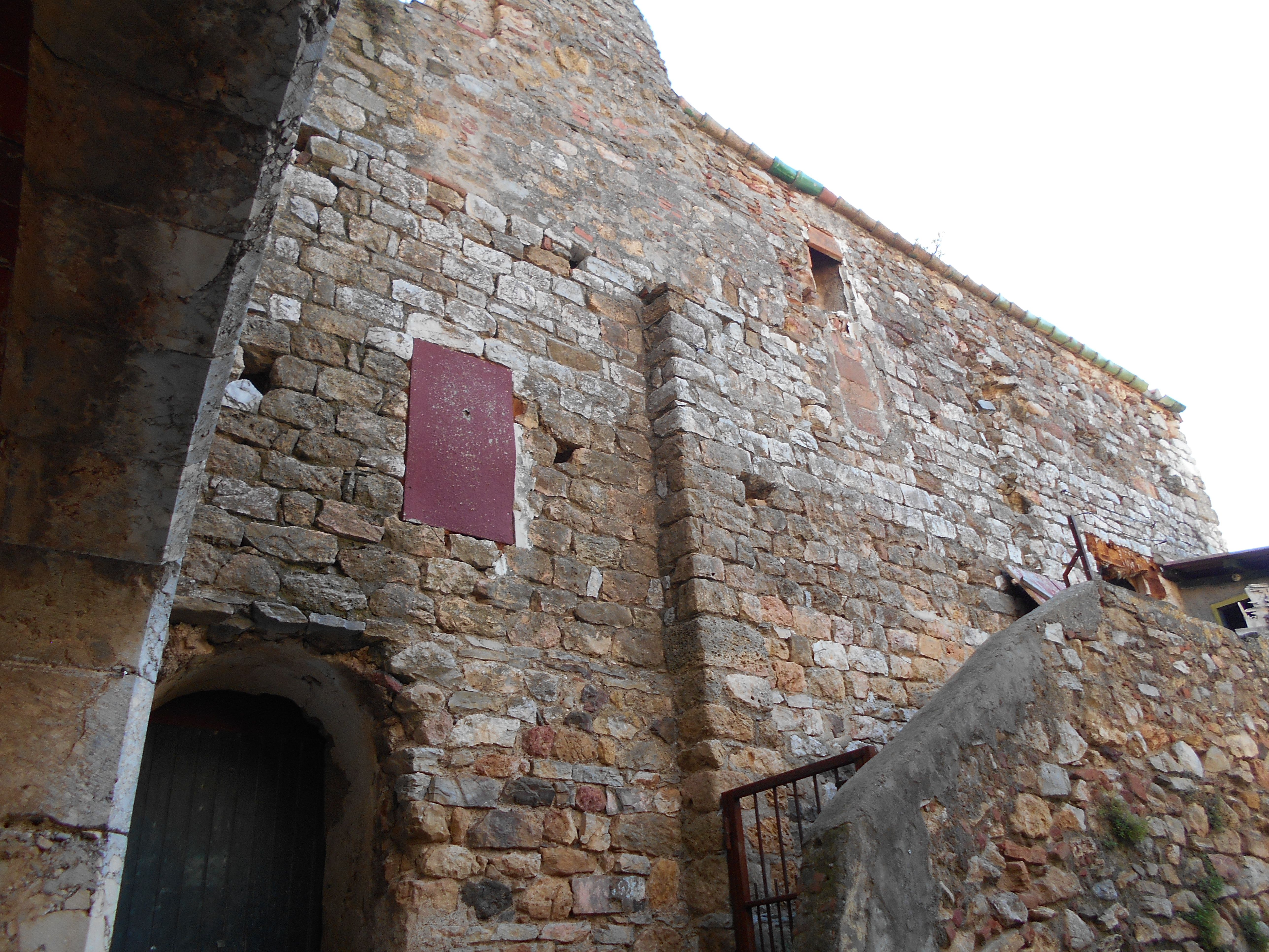 Façana septentrional de l'església de Santa Maria de les Fonts